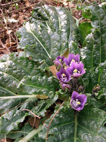 Mandragora autumnalis (Mandragora officinarum) דודא רפואי